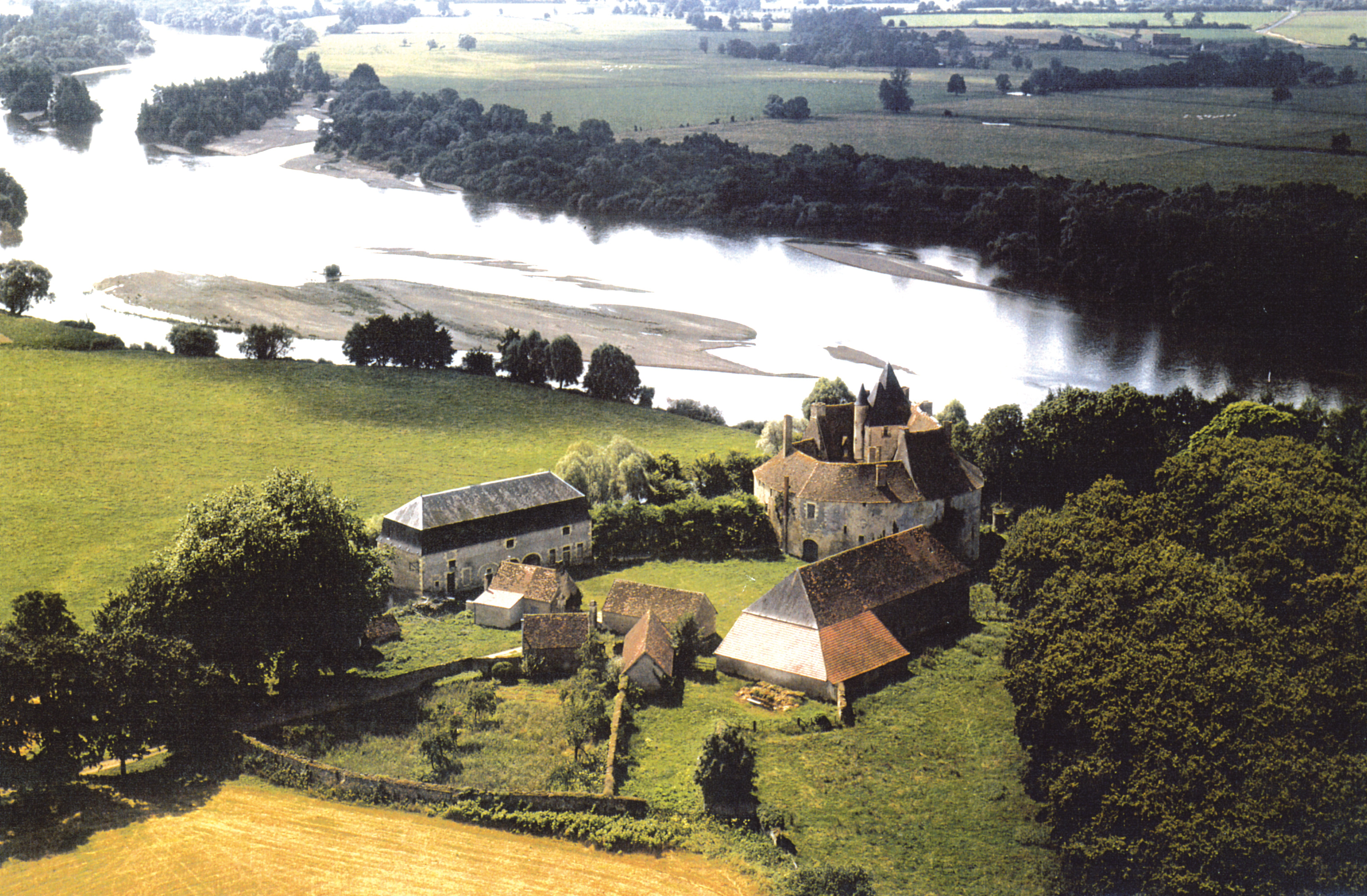 Château de Meauce, vue aérienne, le cliché appartient à la commune de Saincaize-Meauce, publiable avec mention des crédits photos